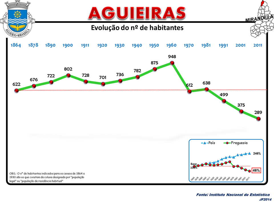 Evolução da População 1864 / 2011